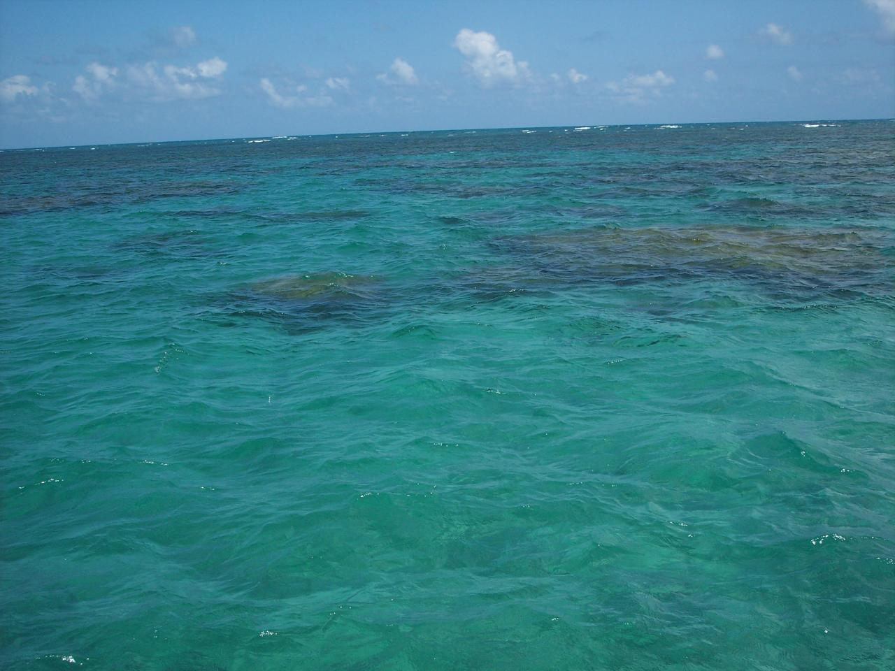 Parrachos de Maracajaú no Rio Grande do Norte, Brasil.